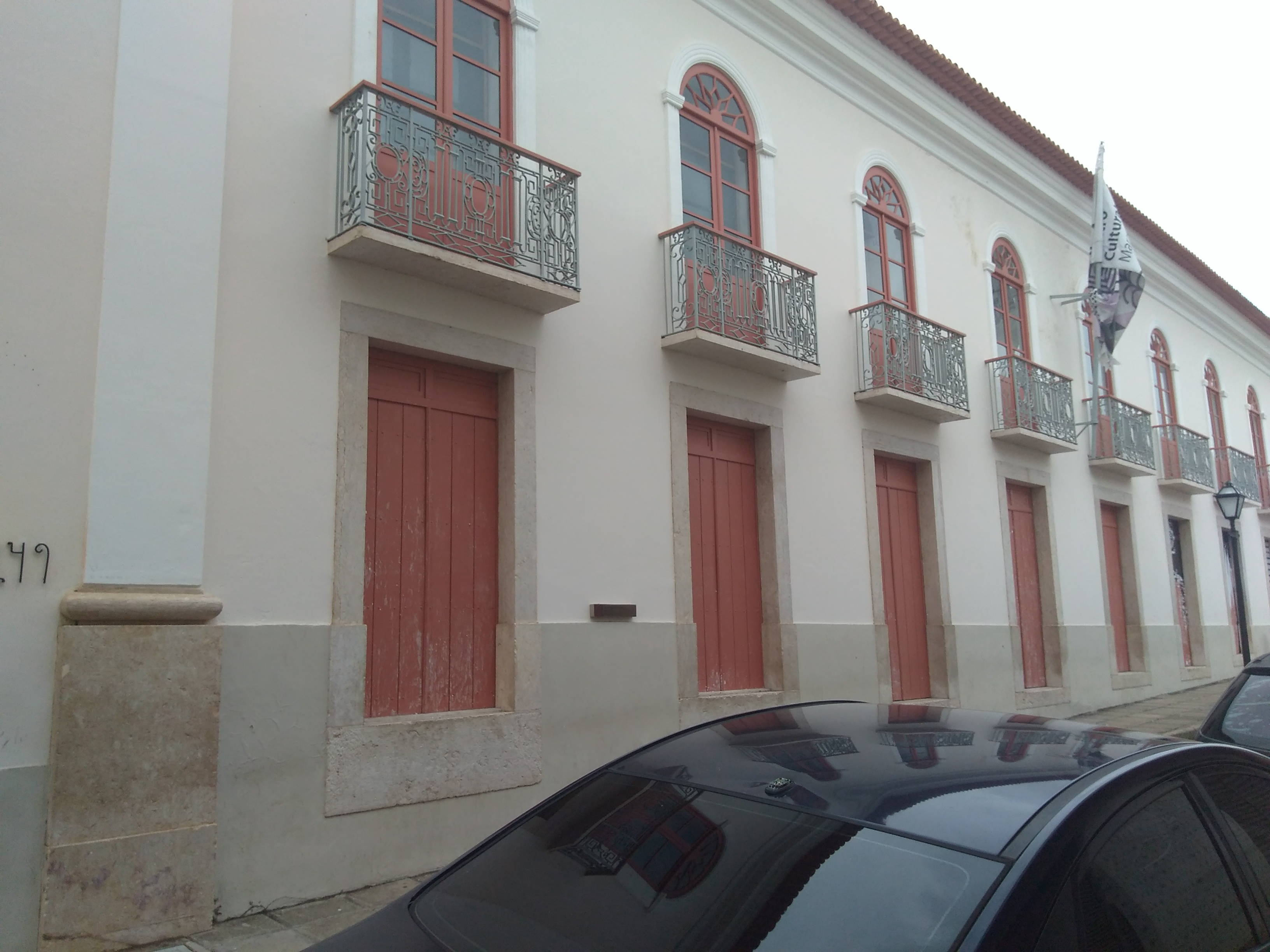 Áreas externa e interna do Centro Cultural VALE Maranhão, contendo exposição, espaço cultural instalado no Centro Histórico da cidade de São Luís, MA